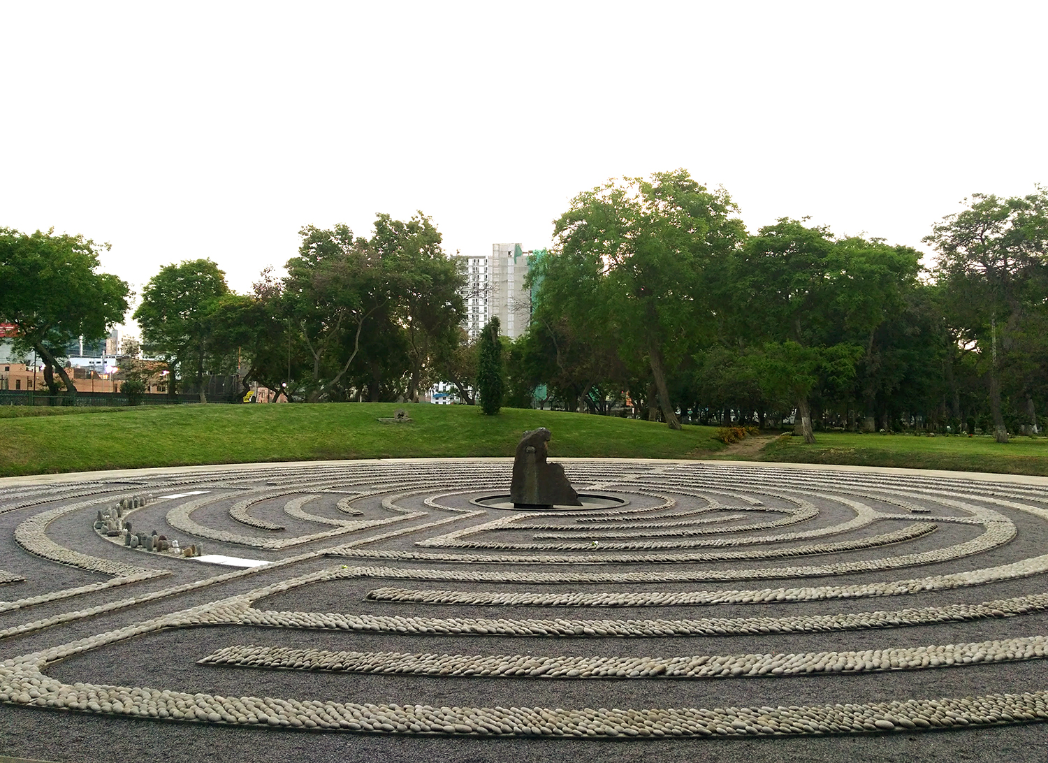 Memorial El ojo que llora, obra de la escultora holandesa radicada en el Perú Lika Mutal, realizado en homenaje a las victimas del conflicto armado interno en el Perú. Este monumento fue declarado patrimonio cultural de la nación por el Ministerio de Cultura del Perú en el año 2013.